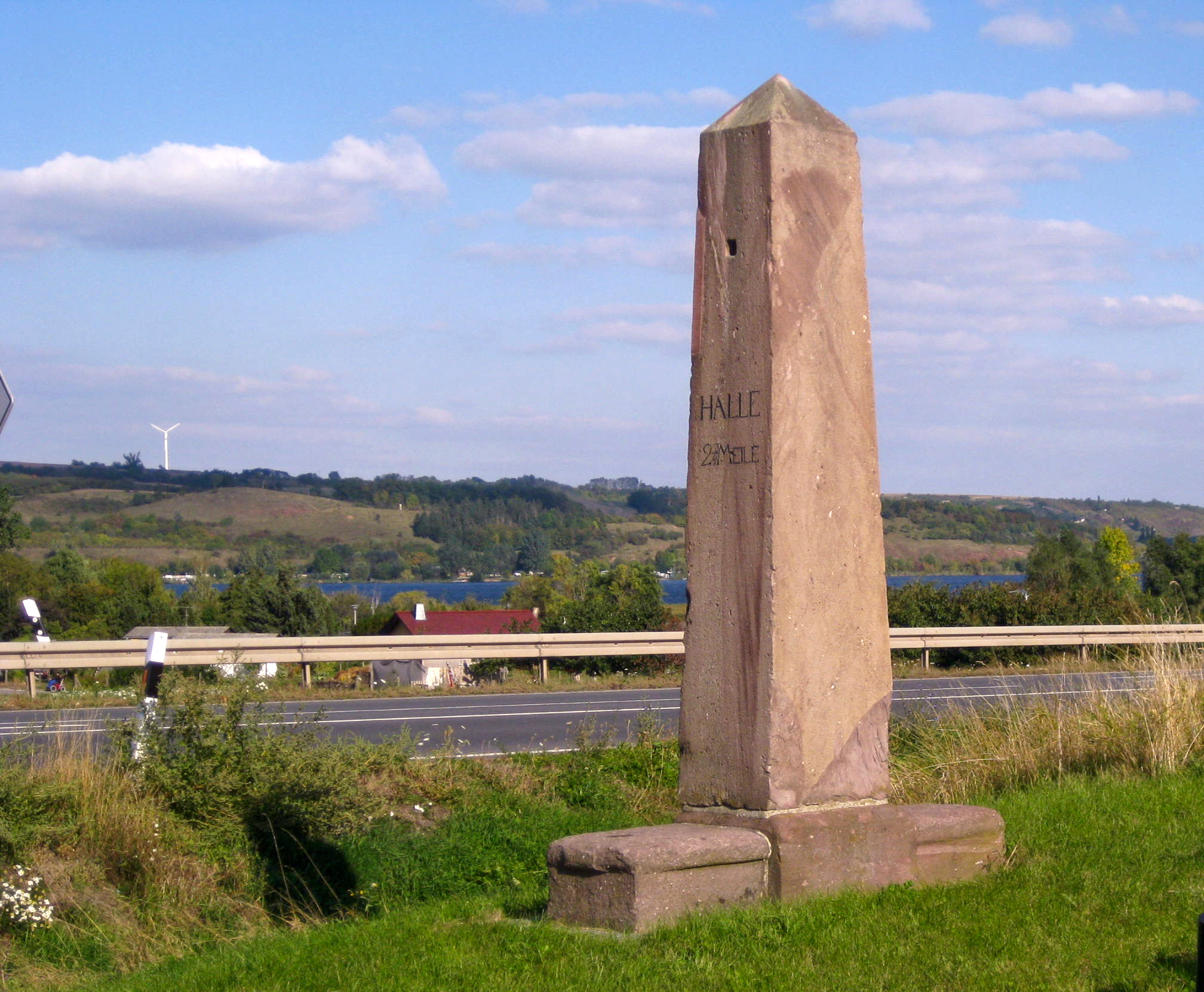 Preußischer Ganzmeilenobelisk mit Sitzbank bei Aseleben